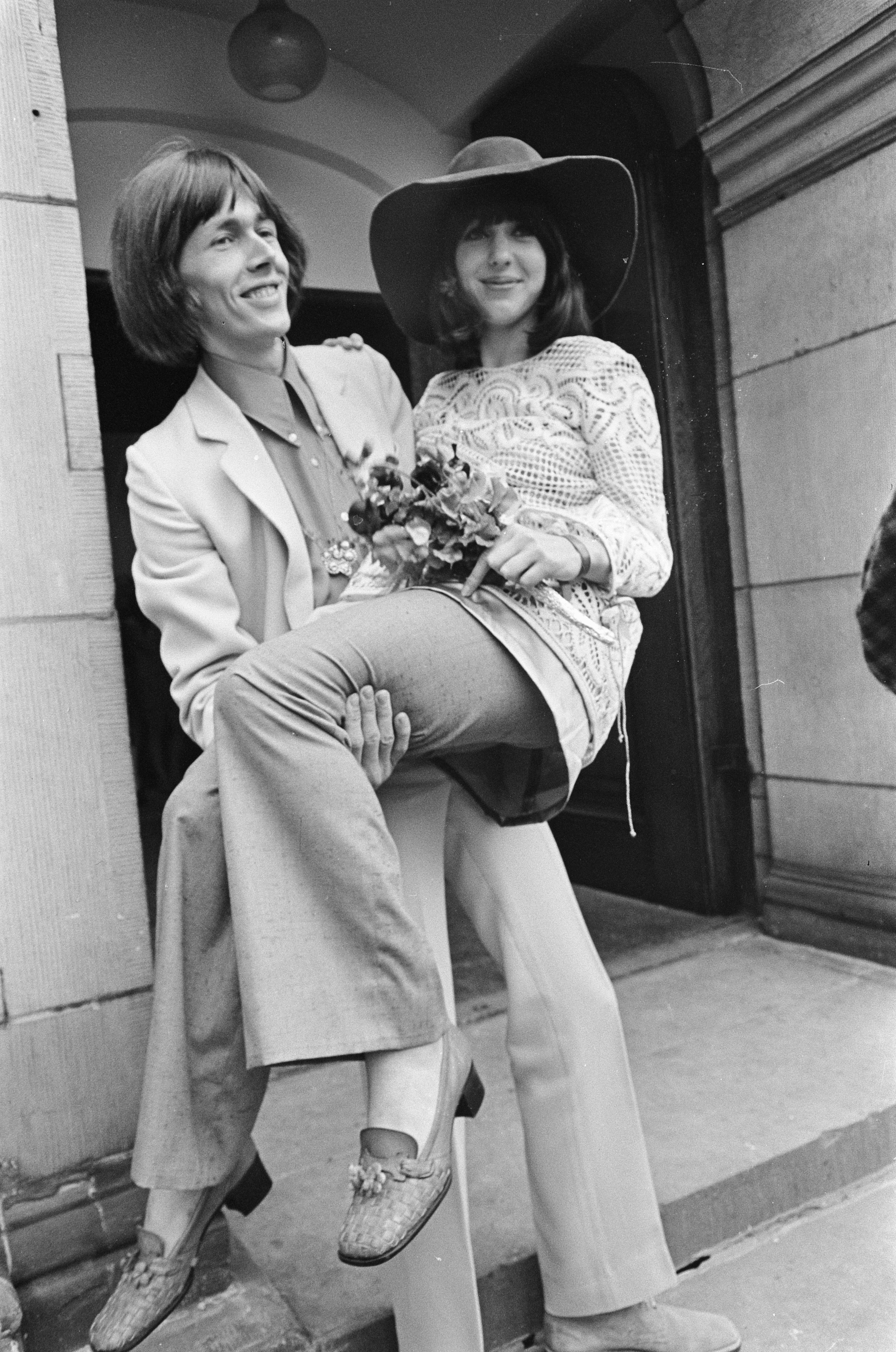 Huwelijk Rikkert Zuiderveld en Elly Nieman te Amsterdam Datum 30 juli 1968